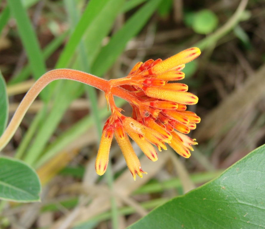 Palicourea squarrosa - RUBIACEAE Parque Olhos D´Água - Brasília - Distrito Federal - Brasil